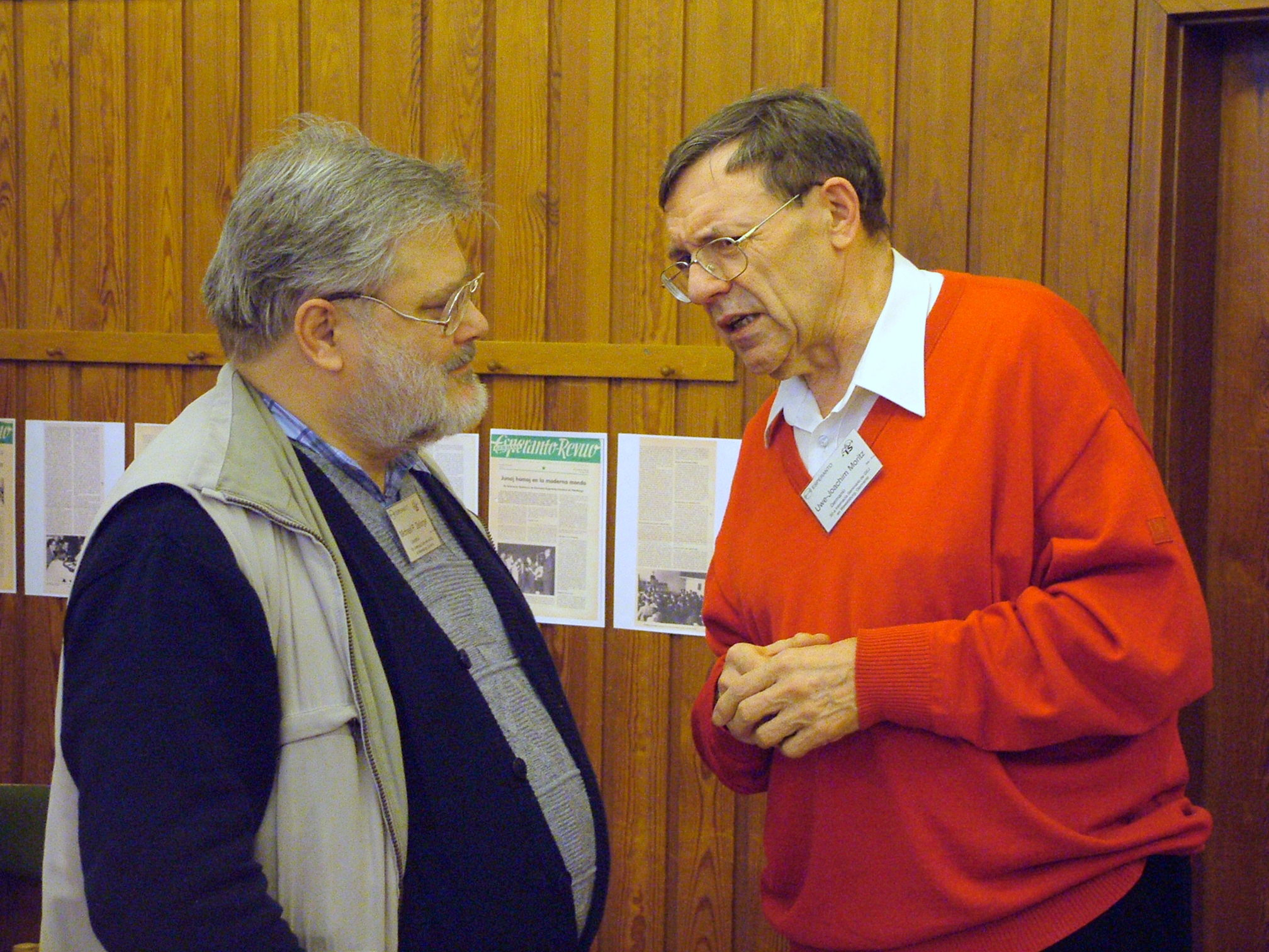 Michael Zeilinger kaj Uwe Joachim Moritz, prezidintoj de GEJ, IS 2006/2007, Wewelsburg, jubilea arangxo pri kvindekfojigxo de IS